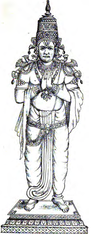 Kulasekhara Alwar